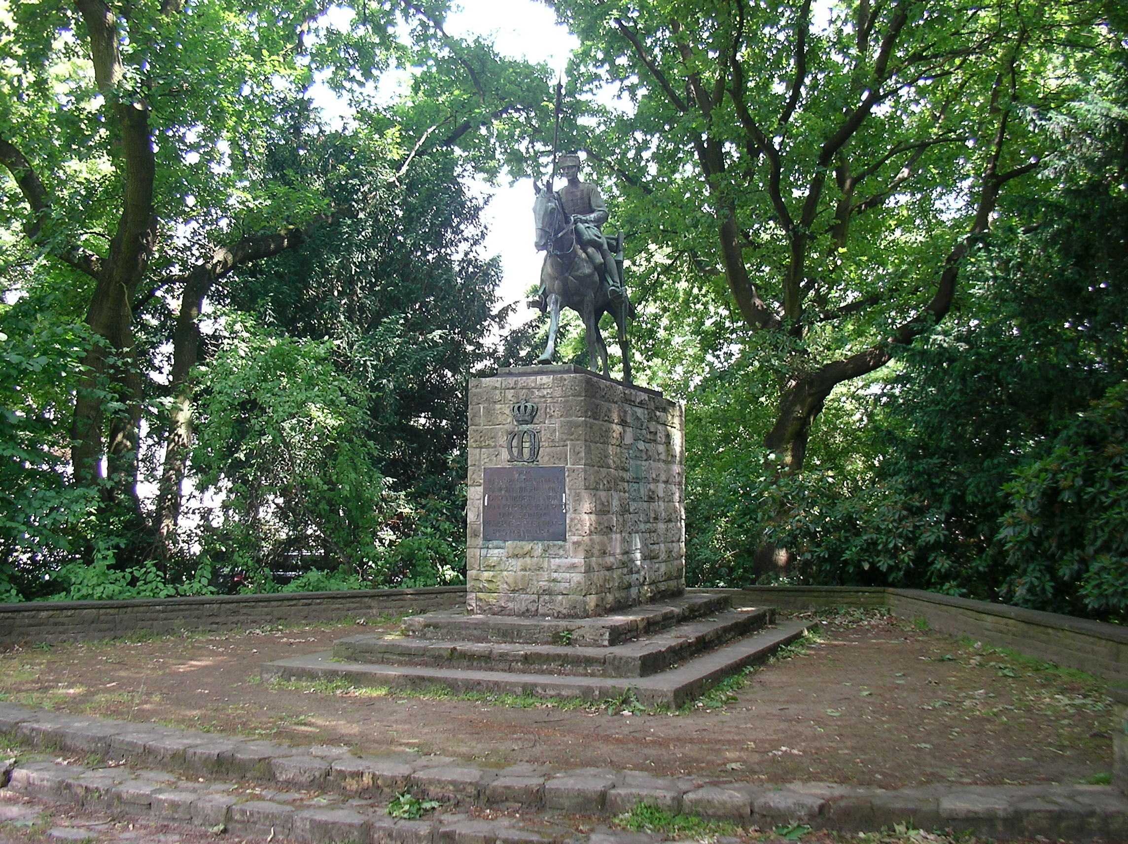 Hamburger Stadtteil Marienthal: Husarendenkmal, ein lebensgroßer Meldereiter aus Bronze von 1938